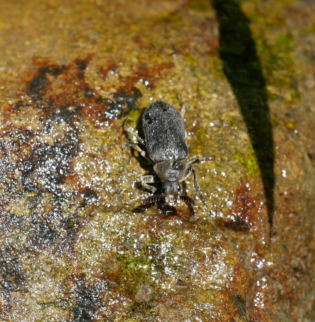 Sandalus segnis：クチキクシヒゲムシ 2018/07/02 和歌山県高野山：Kouyasan, Wakayama pref. Japan